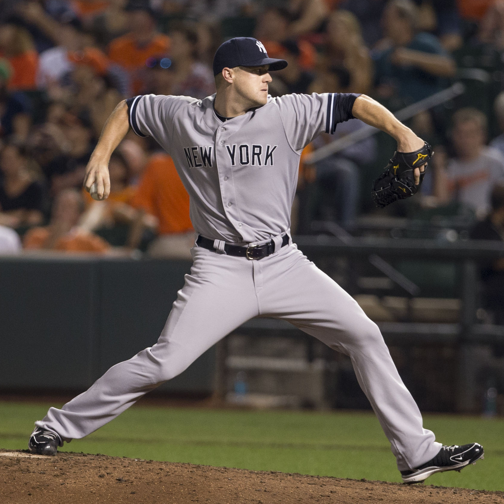 Shawn Kelley